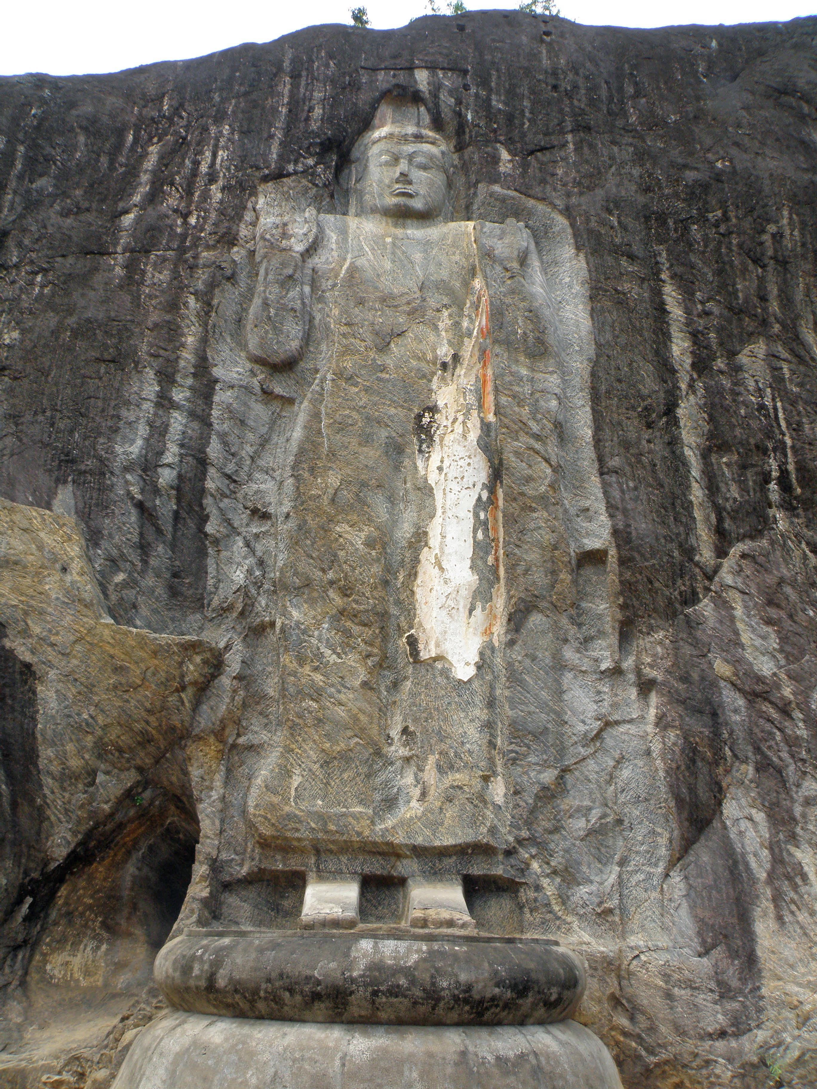 Buduruwagala - Avec 15 m de hauteur, c'est le plus grand Bouddha debout du Sri Lanka